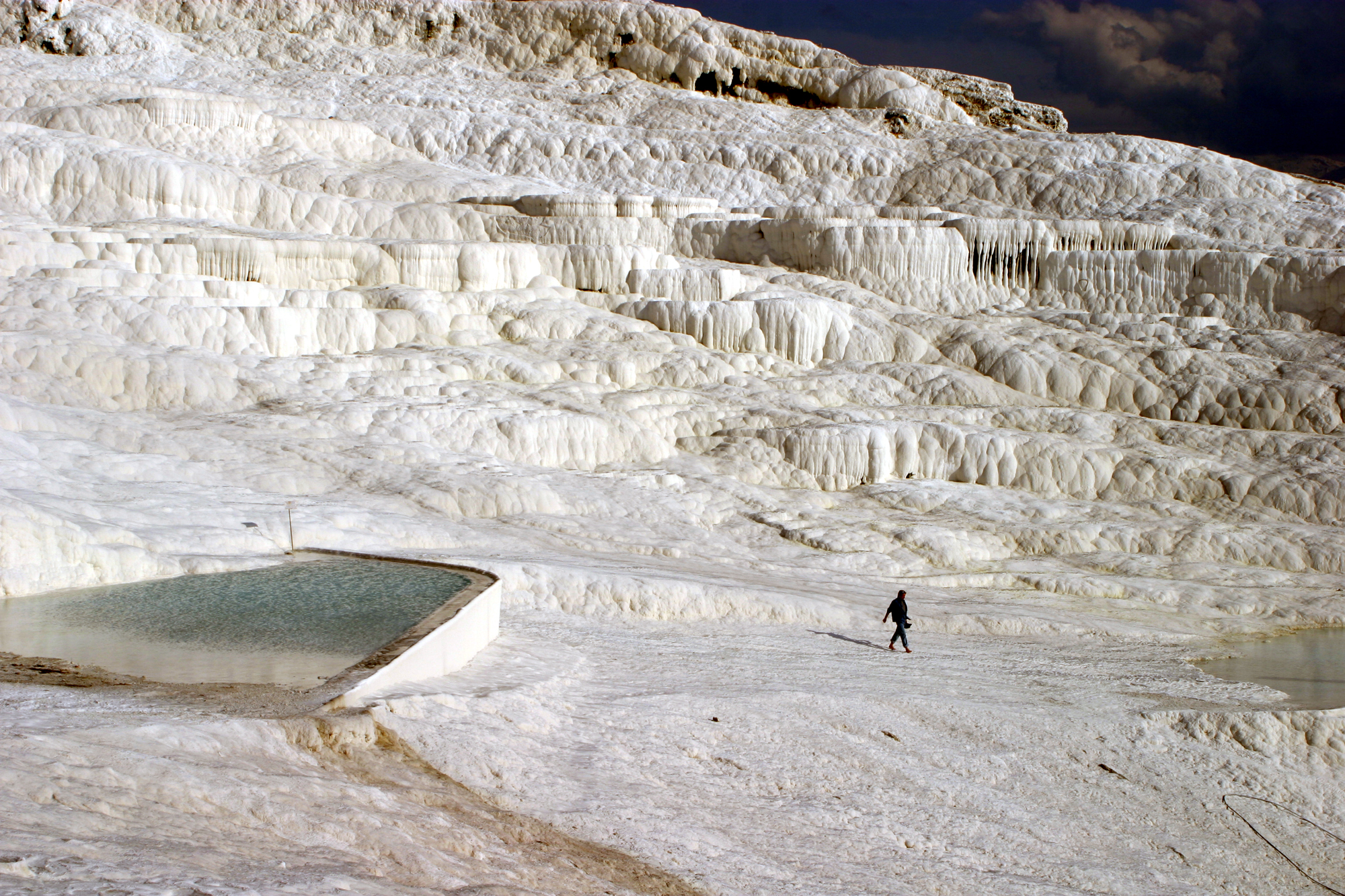 Pamukkale